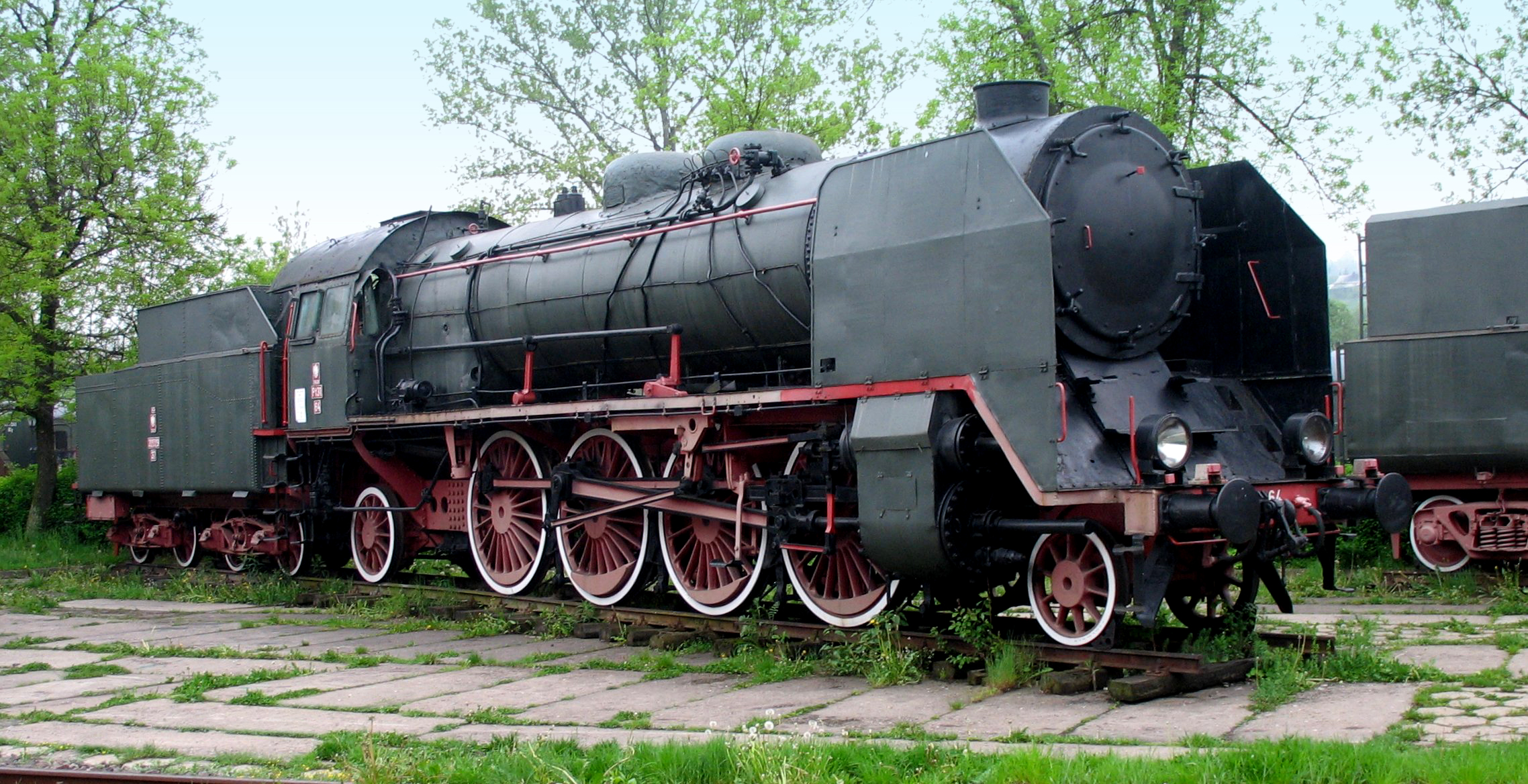 Lokomotywa parowa Pt31-64